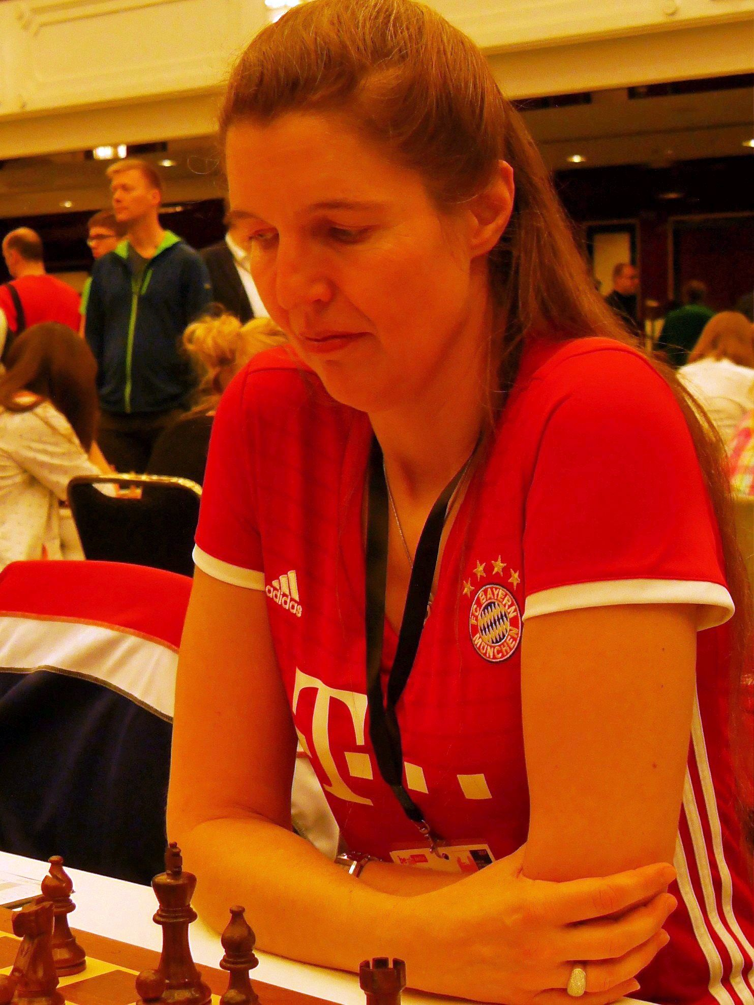 Anita Stangl, Finalrunden der deutschen Schachbundesliga 2017 in Berlin.